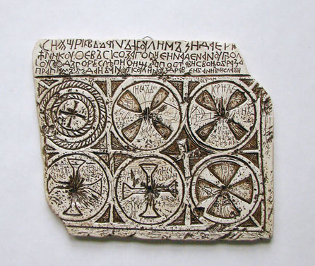 Ploča Kulina bana